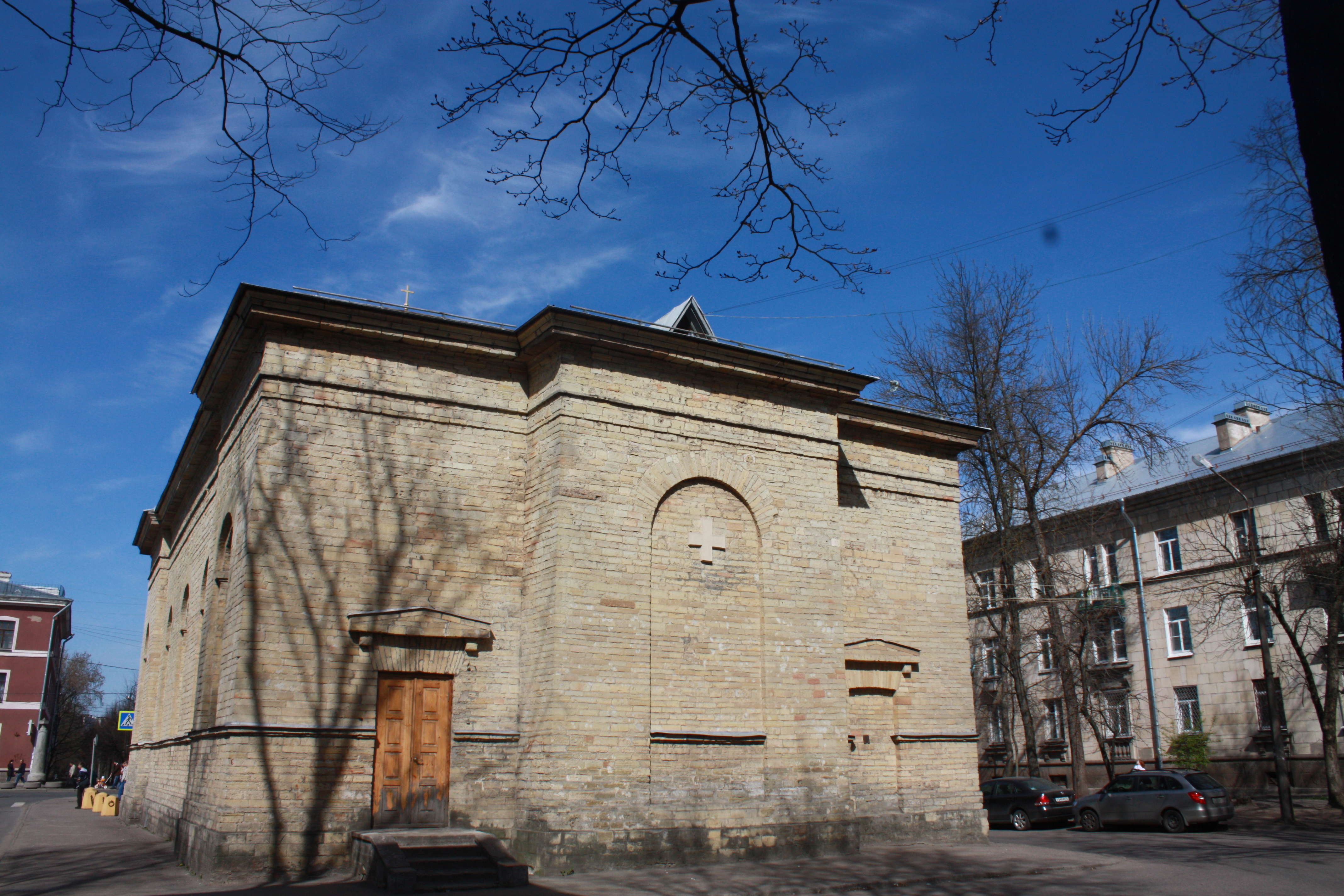 Церковь евангелическо-лютеранская Святого Николая (Санкт-Петербург и Лен.область, Гатчина, проспект 25 Октября, 61)